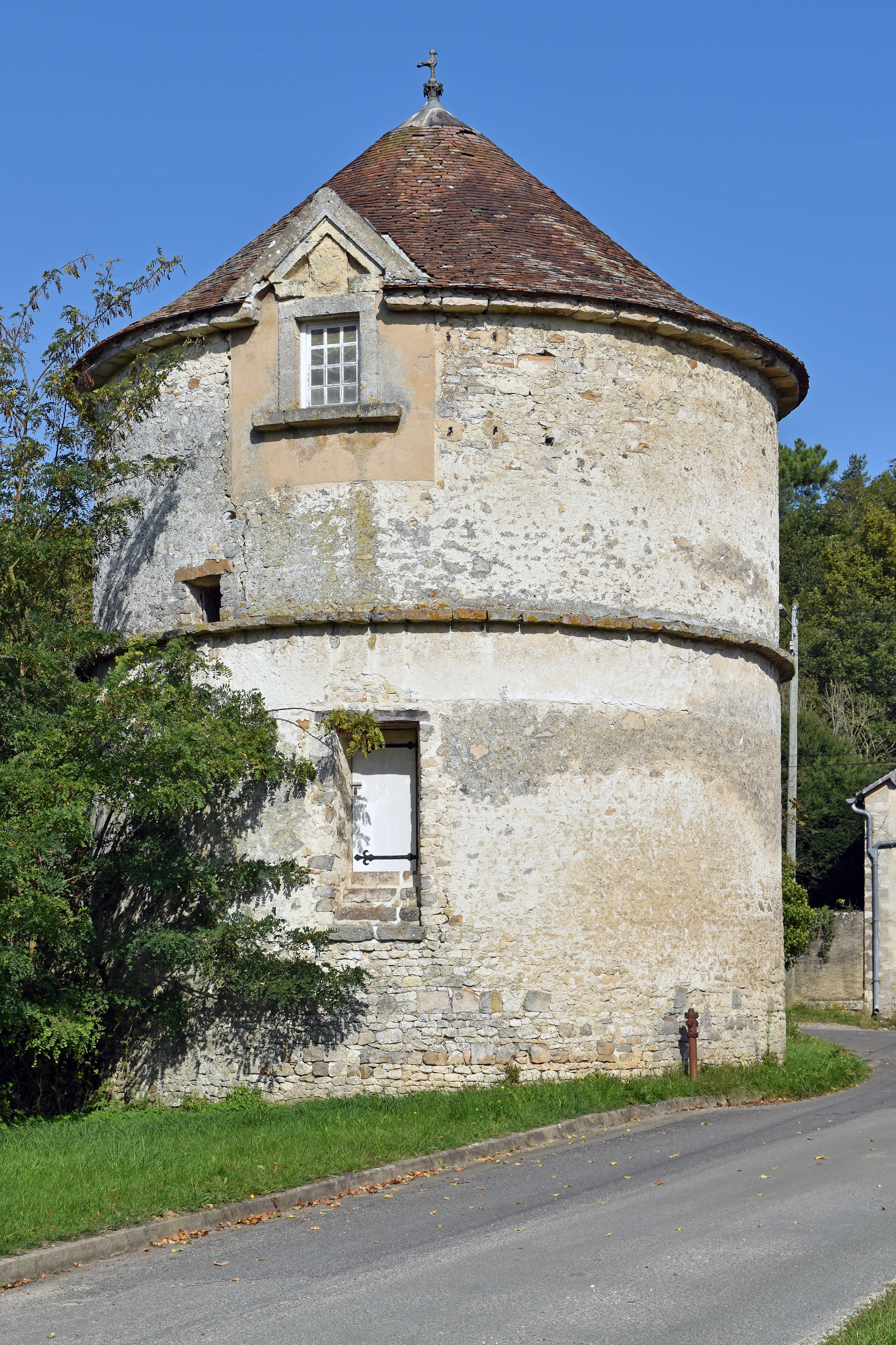 Pigeonnier du Château de Faÿ-lès-Nemours, Seine et Marne, France .